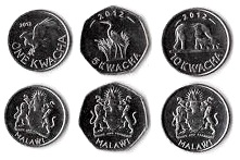 Monedas actuales de Malawi